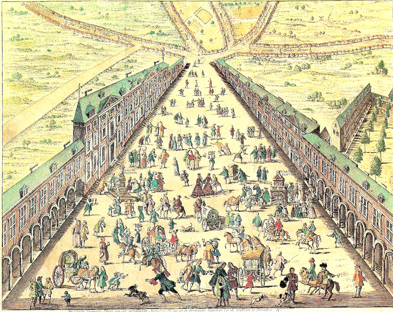 Kurleben auf der Komphausbadstrasse aus "Beschrijving van de Stad Aken", 1727 Hrsg. Johan du Vivic, Leyden; Die Gebäude auf der linken Seiten sind das Rosen-, Cornelius- und Karlsbad.